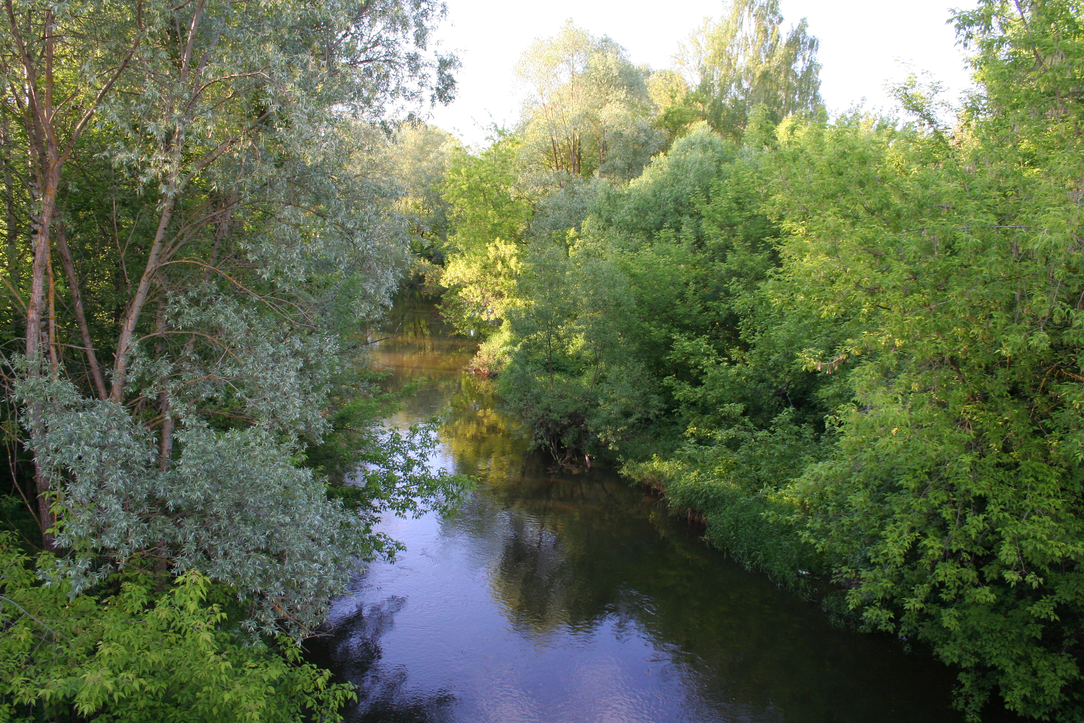 Stadt Kondrowo, Oblast Kaluga, Russland. Der Fluss Schanja.